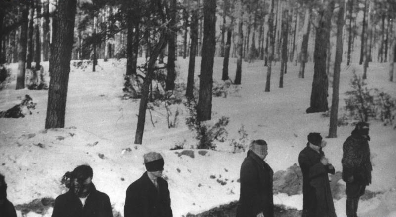 Egzekucja Polaków przez Niemców podczas II wojny światowej w Palmirach.